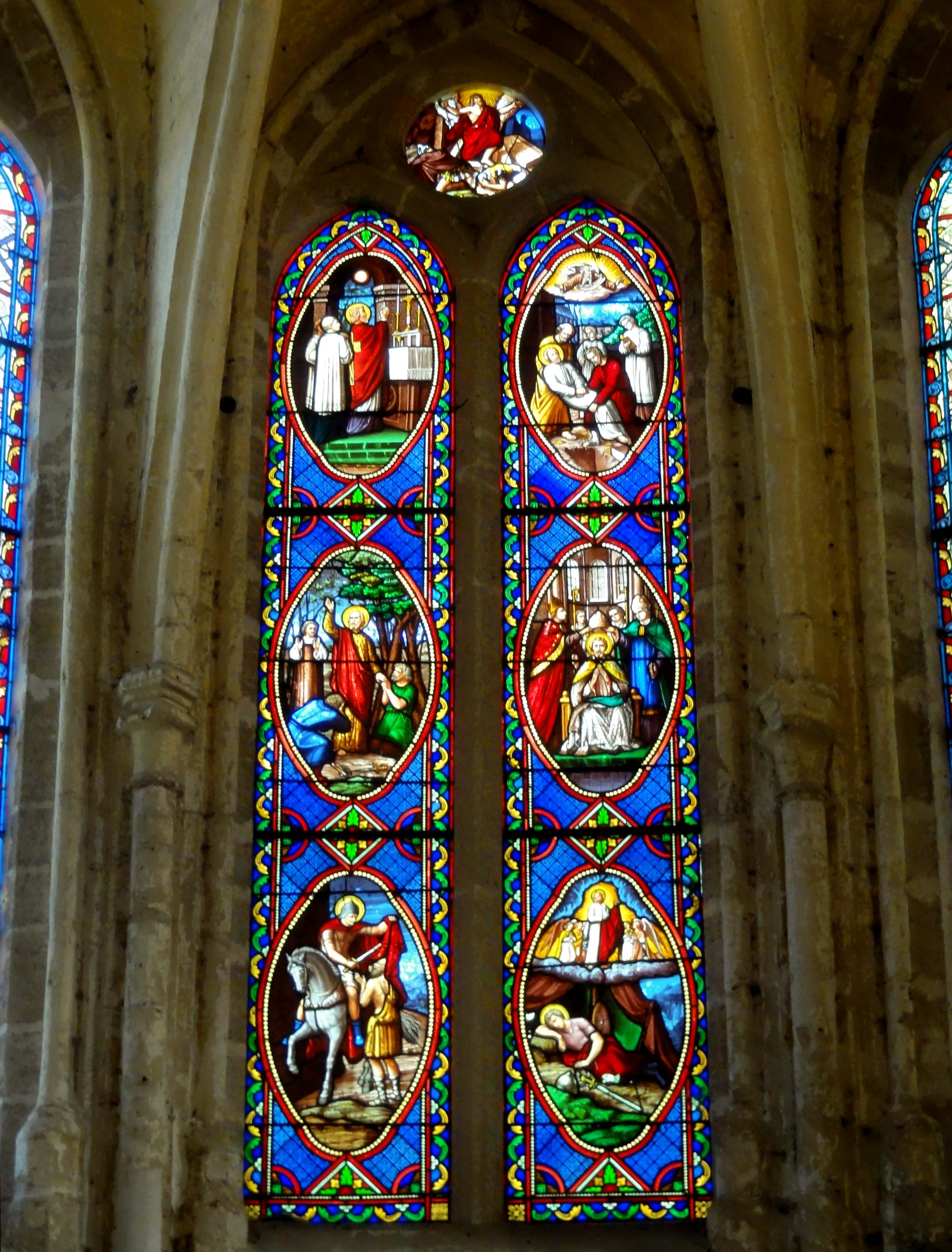 Verrière d'axe de l'abside (n° 0).